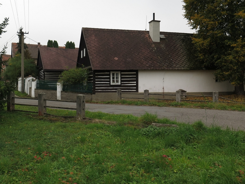 Usedlost čp. 8, Třímany 8, Třímany.